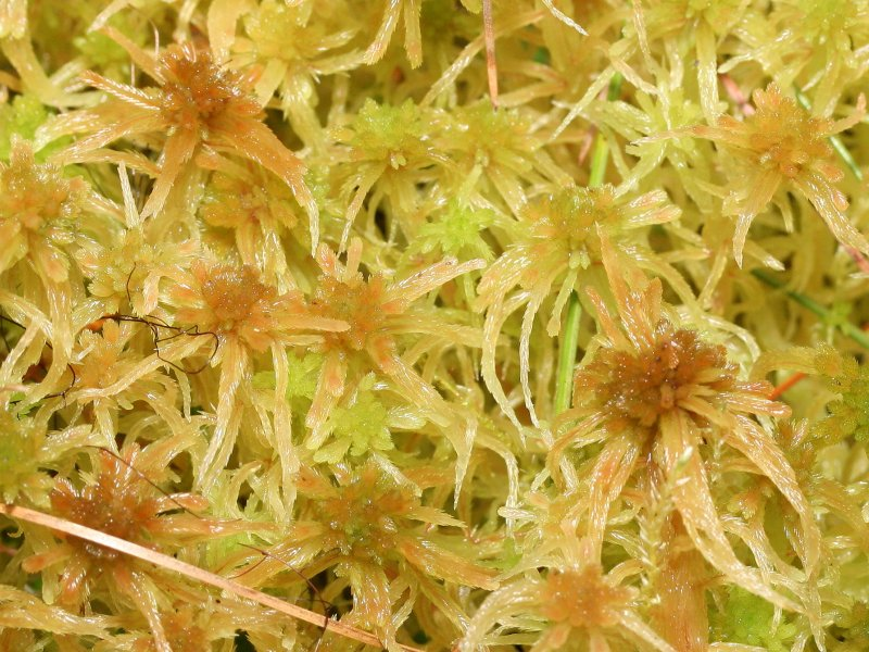 Schmalblättriges Torfmoos (Sphagnum angustifolium)